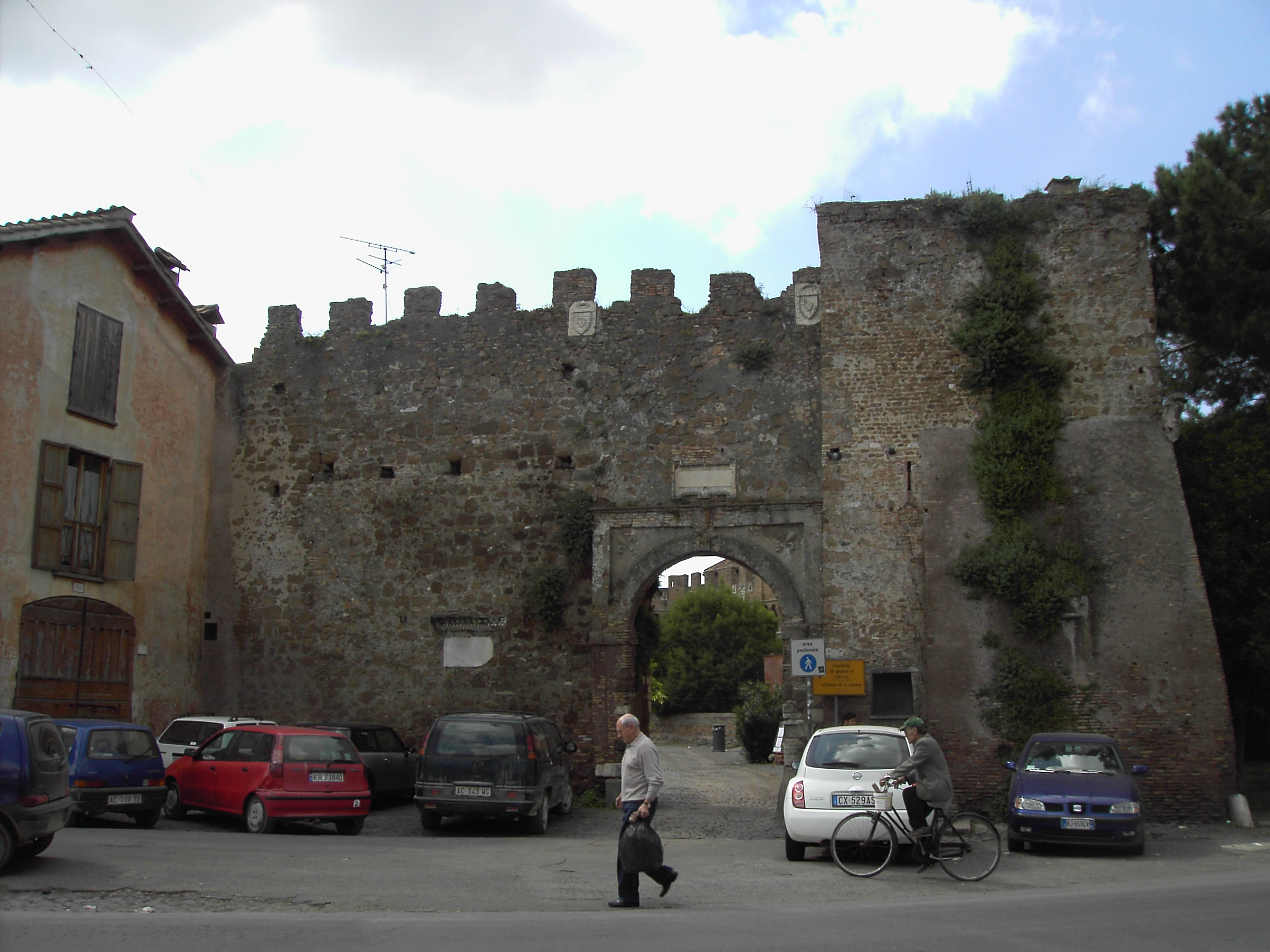 Roma , borgo di Ostia antica: ingresso al borgo